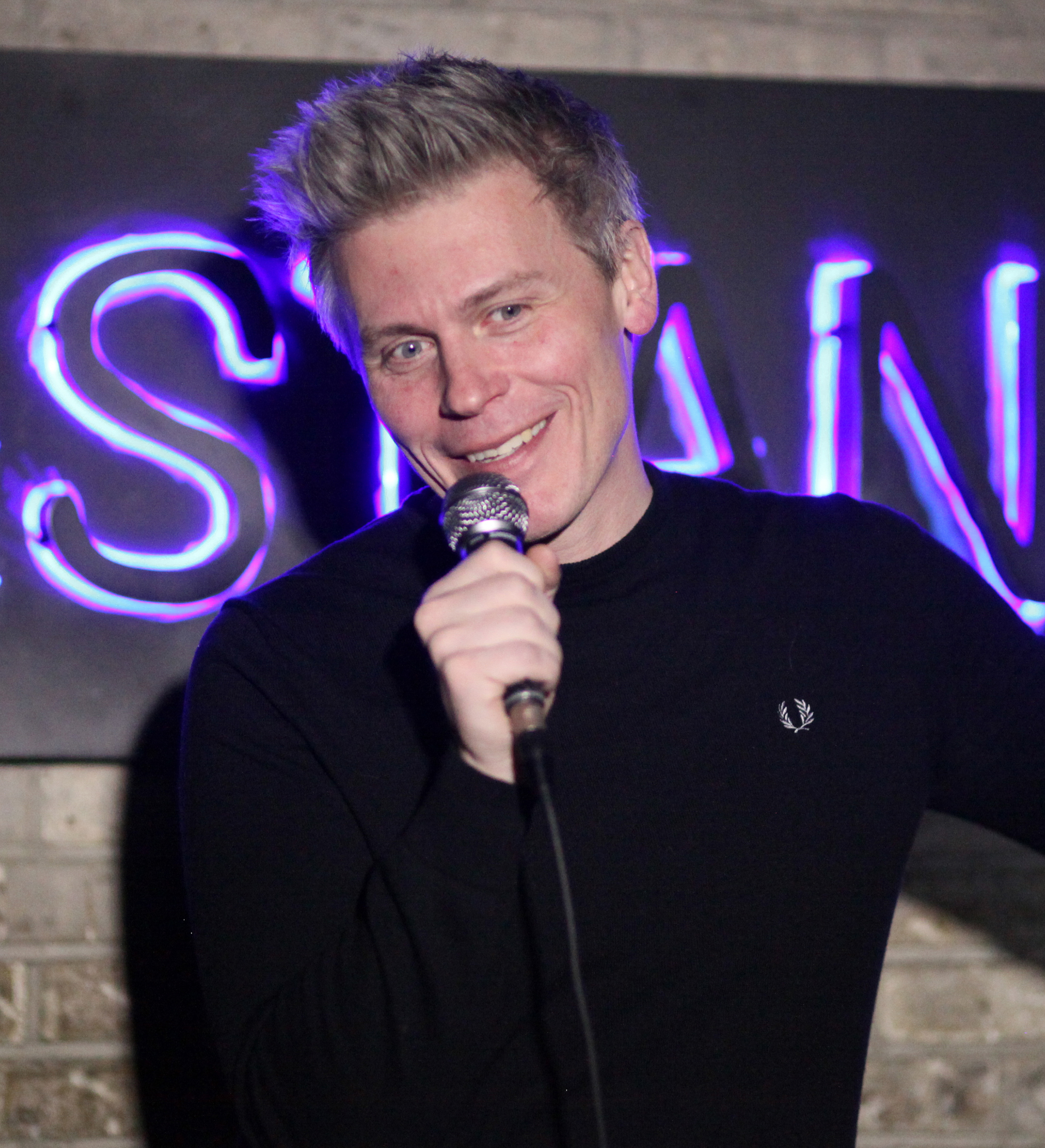 Finnegan in March 2017.